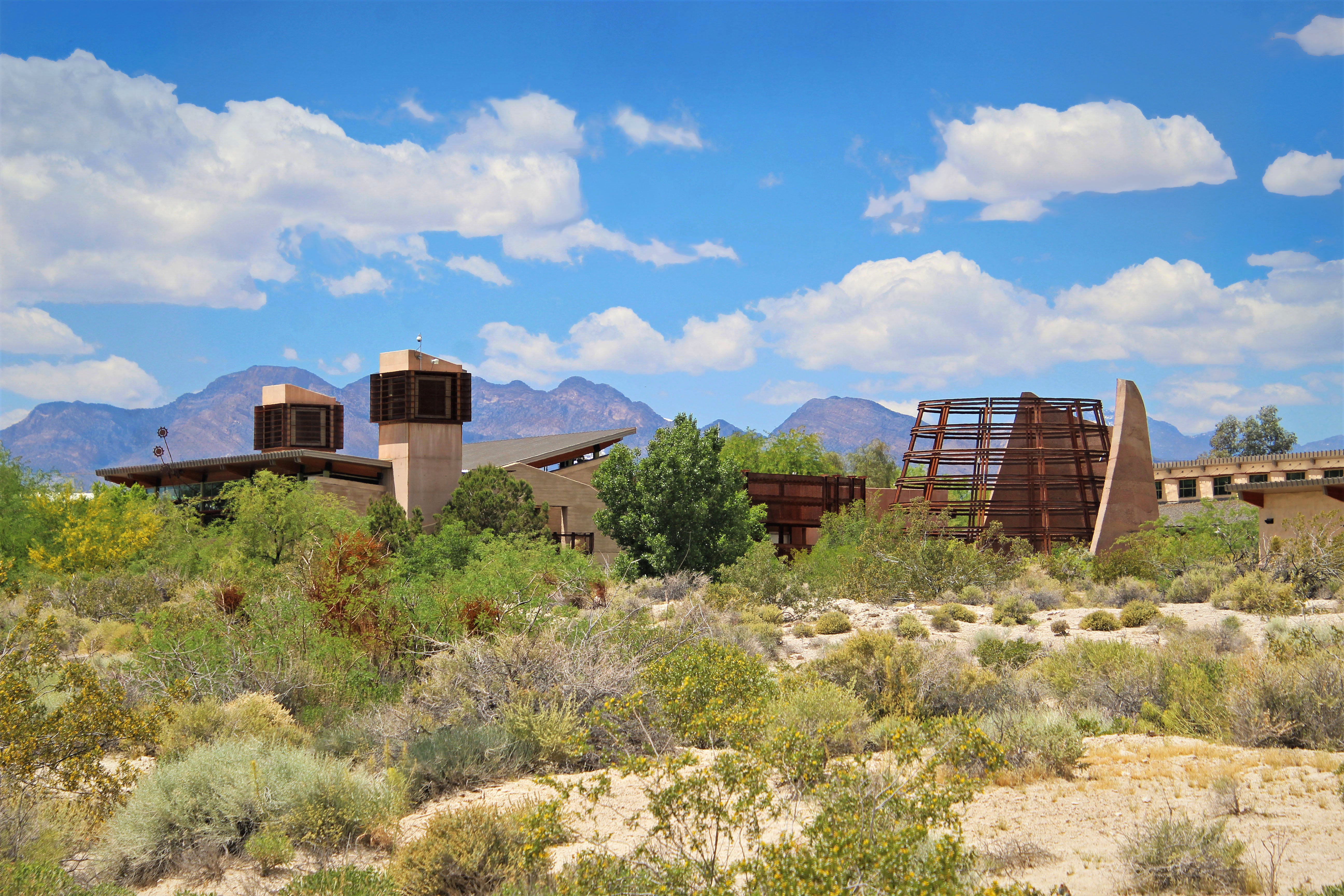 Las Vegas, NV